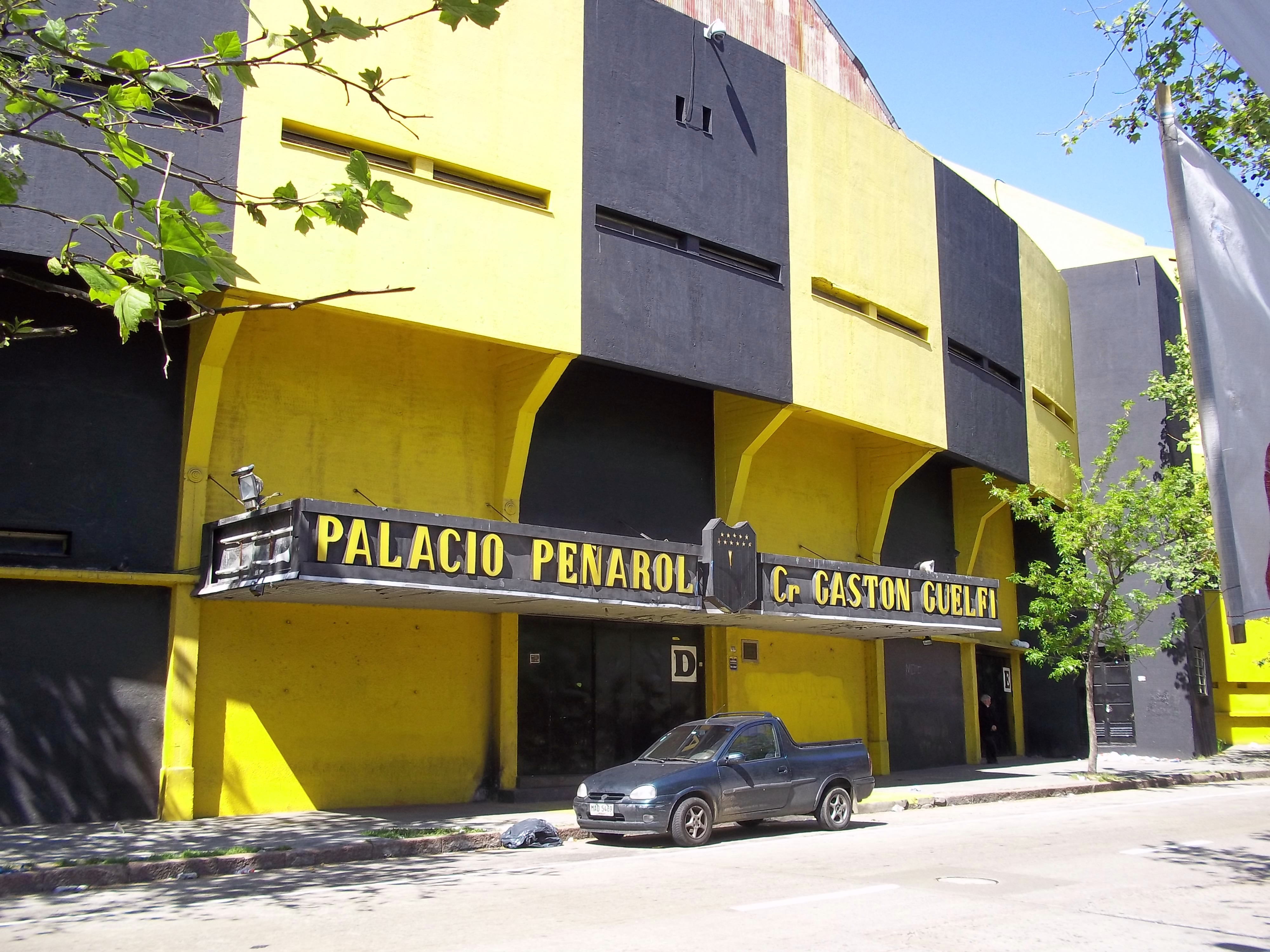 Estadio Contador Gastón Guelfi, también llamado Palacio Peñarol, es el escenario deportivo (básquetbol) del Club Atlético Peñarol. En la imagen, el acceso de la calle Galicia, visto desde la esquina de Galicia y Magallanes, Montevideo, Uruguay.